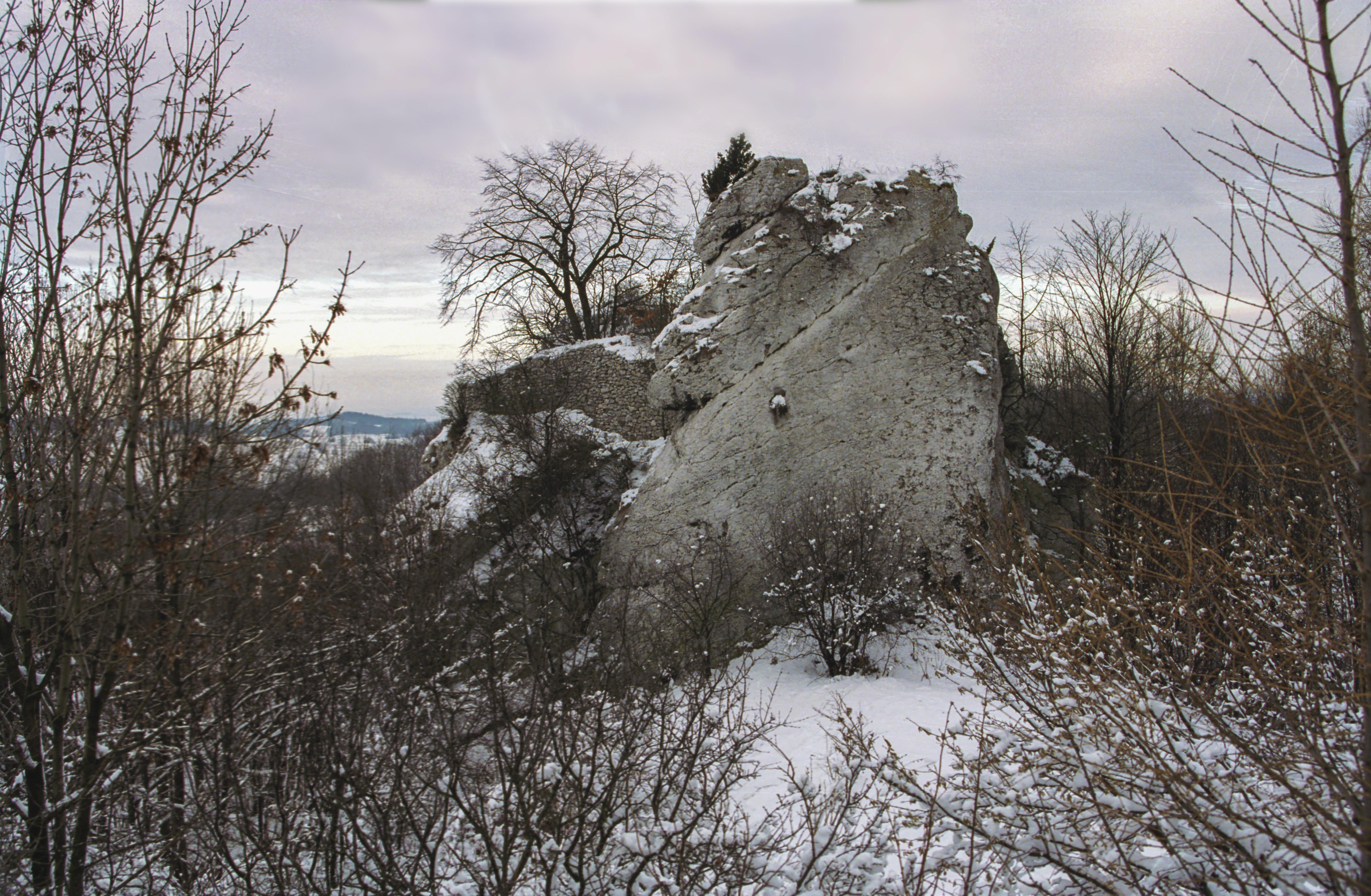 Poland, Jura, Suliszowice Castle